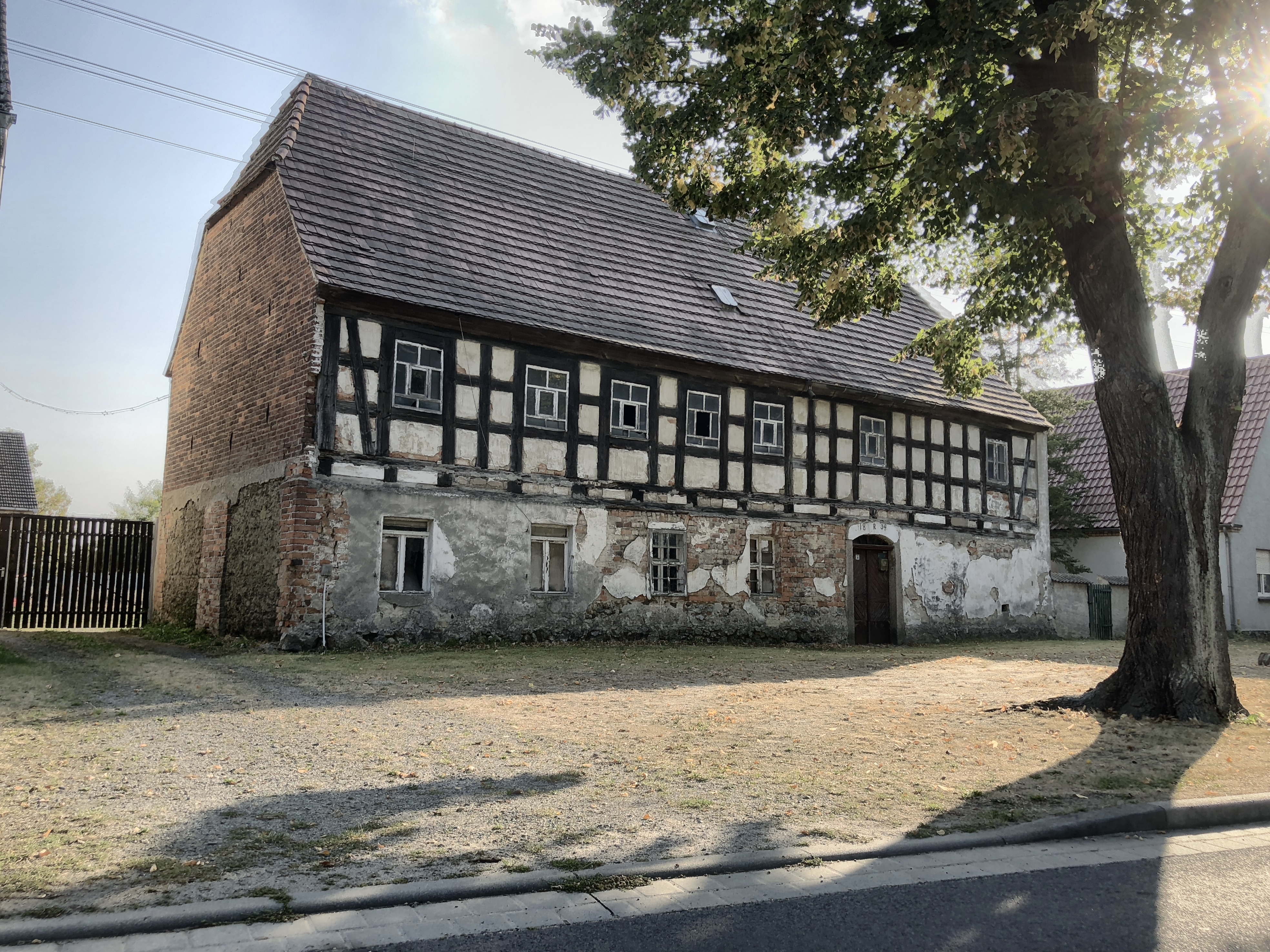 Denkmalgeschütztes Fachwerkhaus in Fischwasser, Gemeinde Heideland, Brandenburg